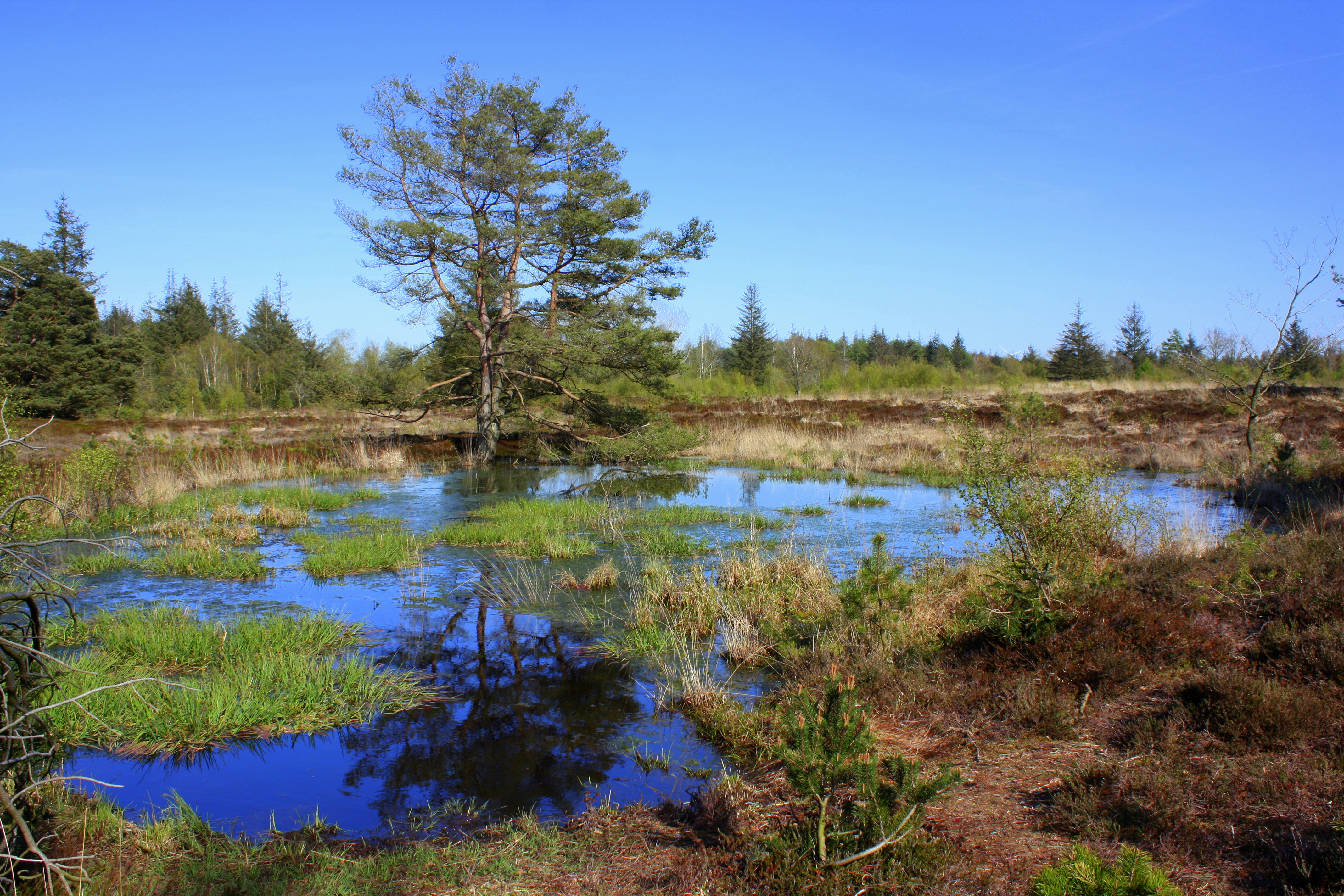 Aufnahme in der Bordelumer Heide; Spiegelung in den Gewässern der teilweise Heidelandschaft. Bordelumer Heide an der Bundesstraße 5 in Richtung Niebüll